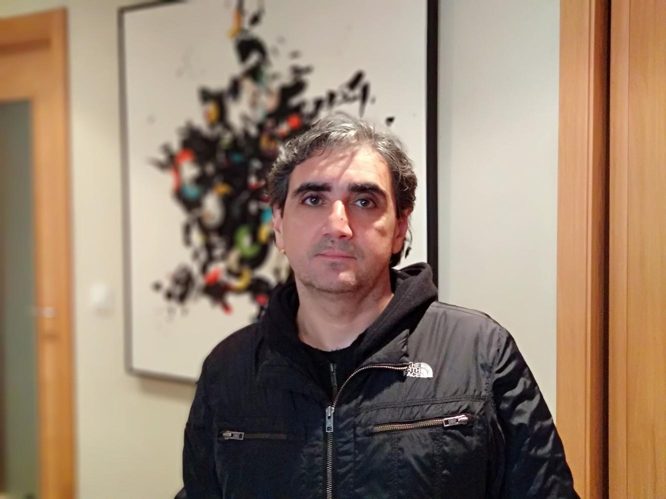 ver título